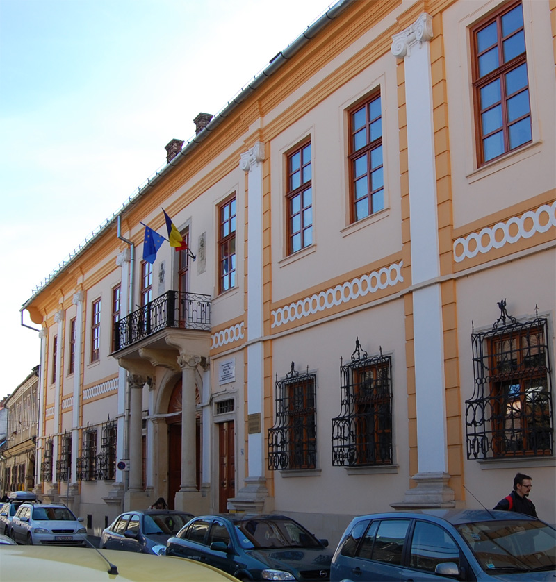 Palatul Tholdalagy-Korda, azi Universitatea "Babeș-Bolyai" - administrația tehnică